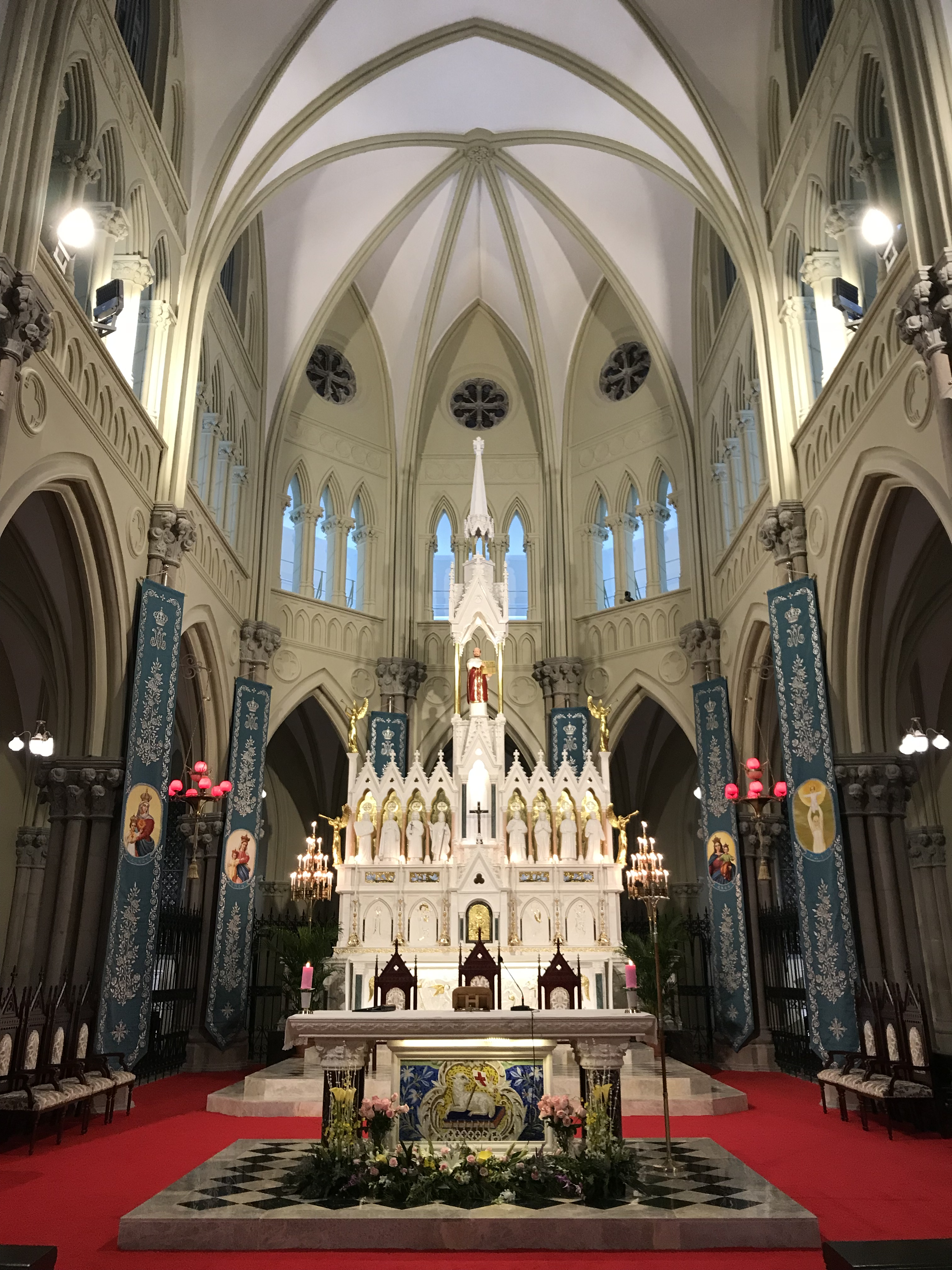 中文（中国大陆）: 徐家汇圣依纳爵堂祭台